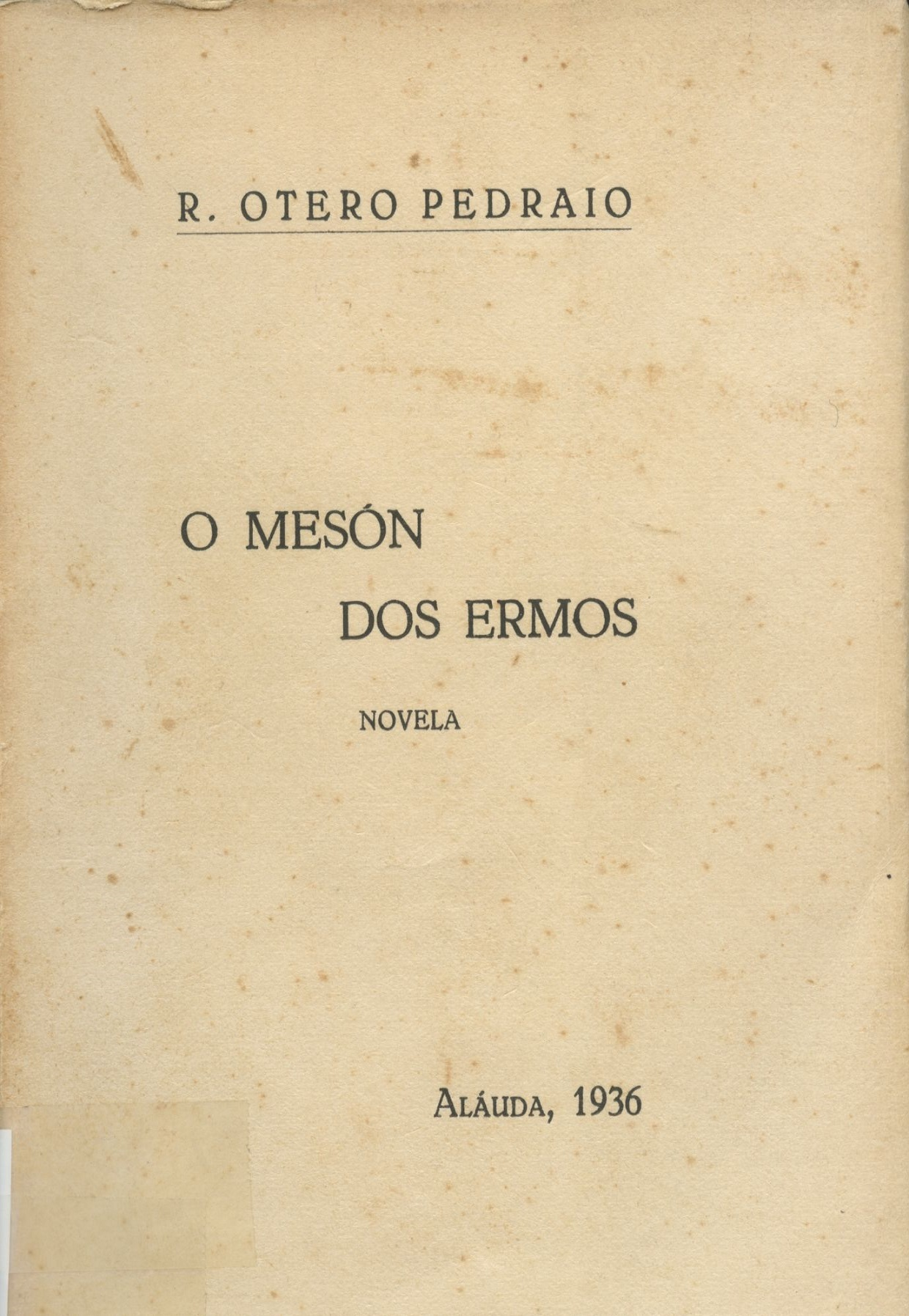 Portada do libro O mesón dos ermos de Ramón Otero Pedrayo.